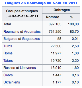 Groupes linguistiques en Dobroudja du Nord (Roumanie), recensement de 2011